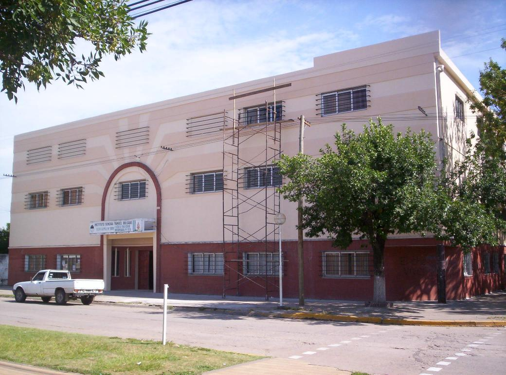 Instituto Superior Particular Incorporado Nº 9094 General Manuel Obligado, Villa Ocampo